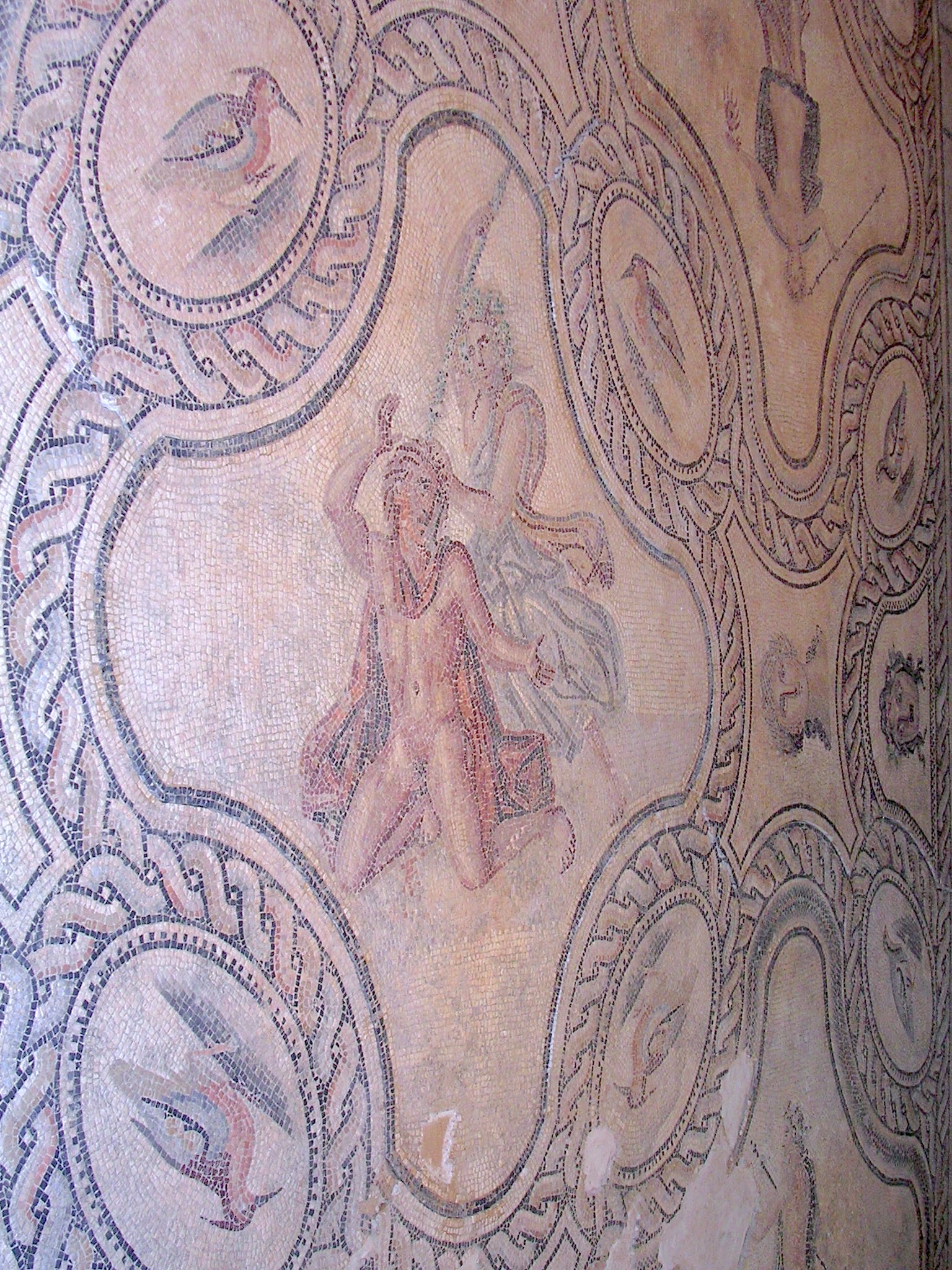 Nîmes - La Mosaïque de Penthée. Scène centrale. Découverte avenue Jean Jaurès à Nîmes (Gard). France. Vestige romain